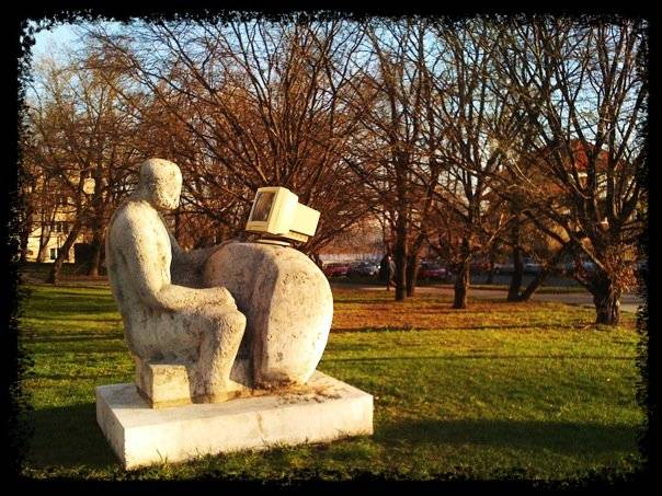 Socha nedaleko koleje Na Větrníku, Praha-Petřiny (sorela).